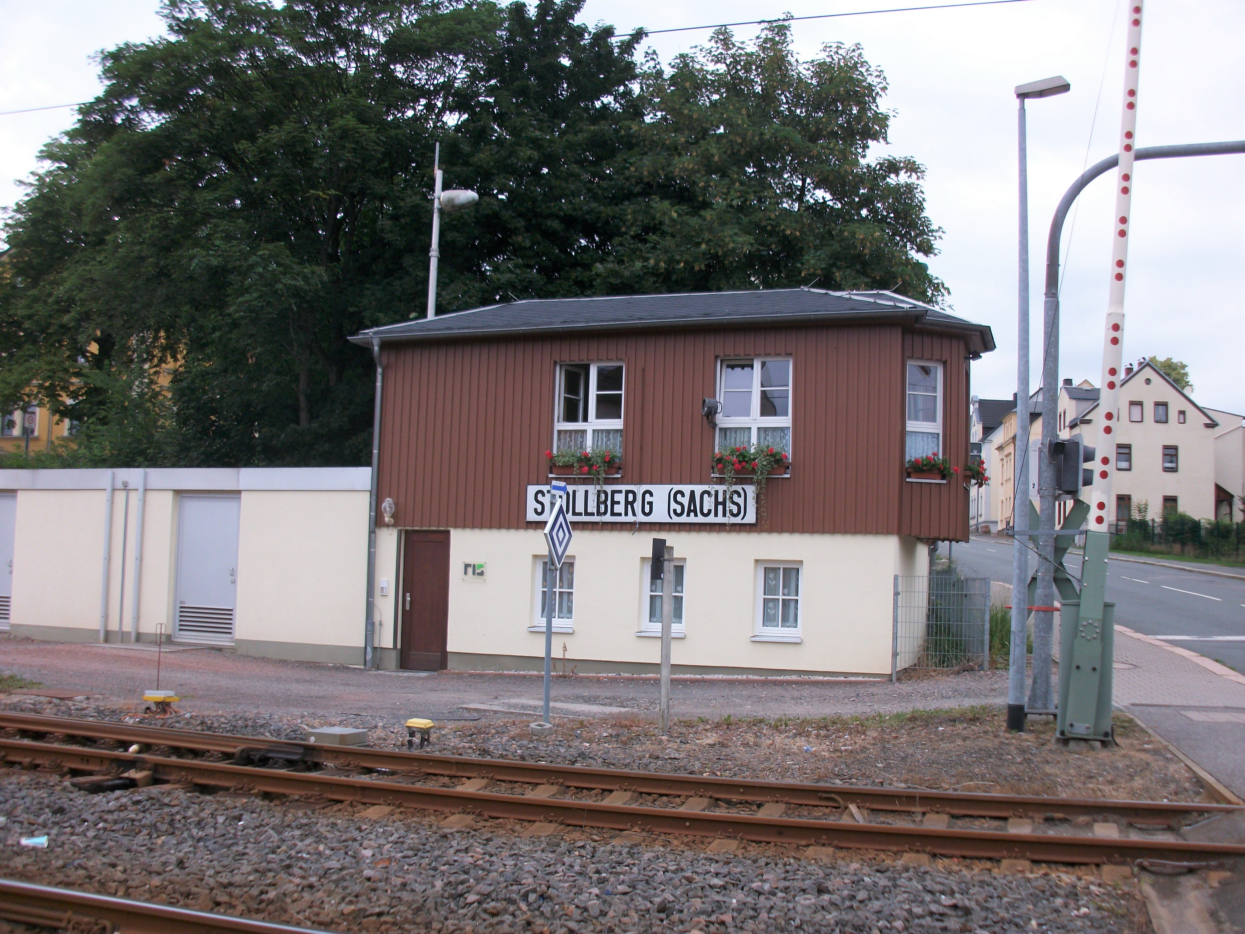 Bahnhof Stollberg (Sachs), Stellwerk (2018)